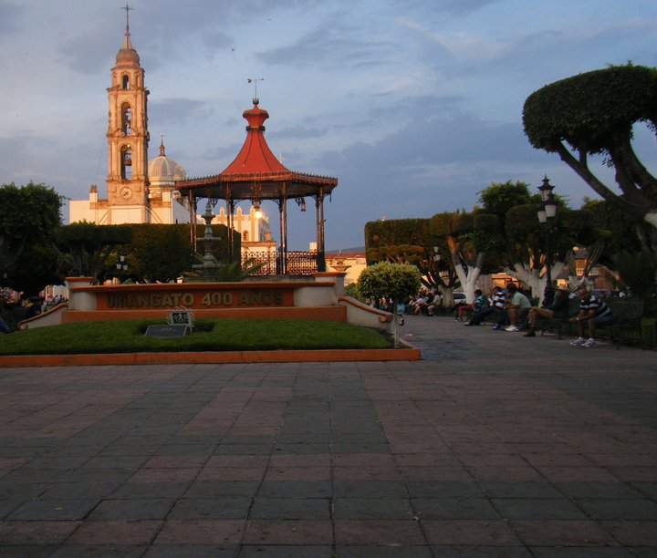 Jardin de Uriangato